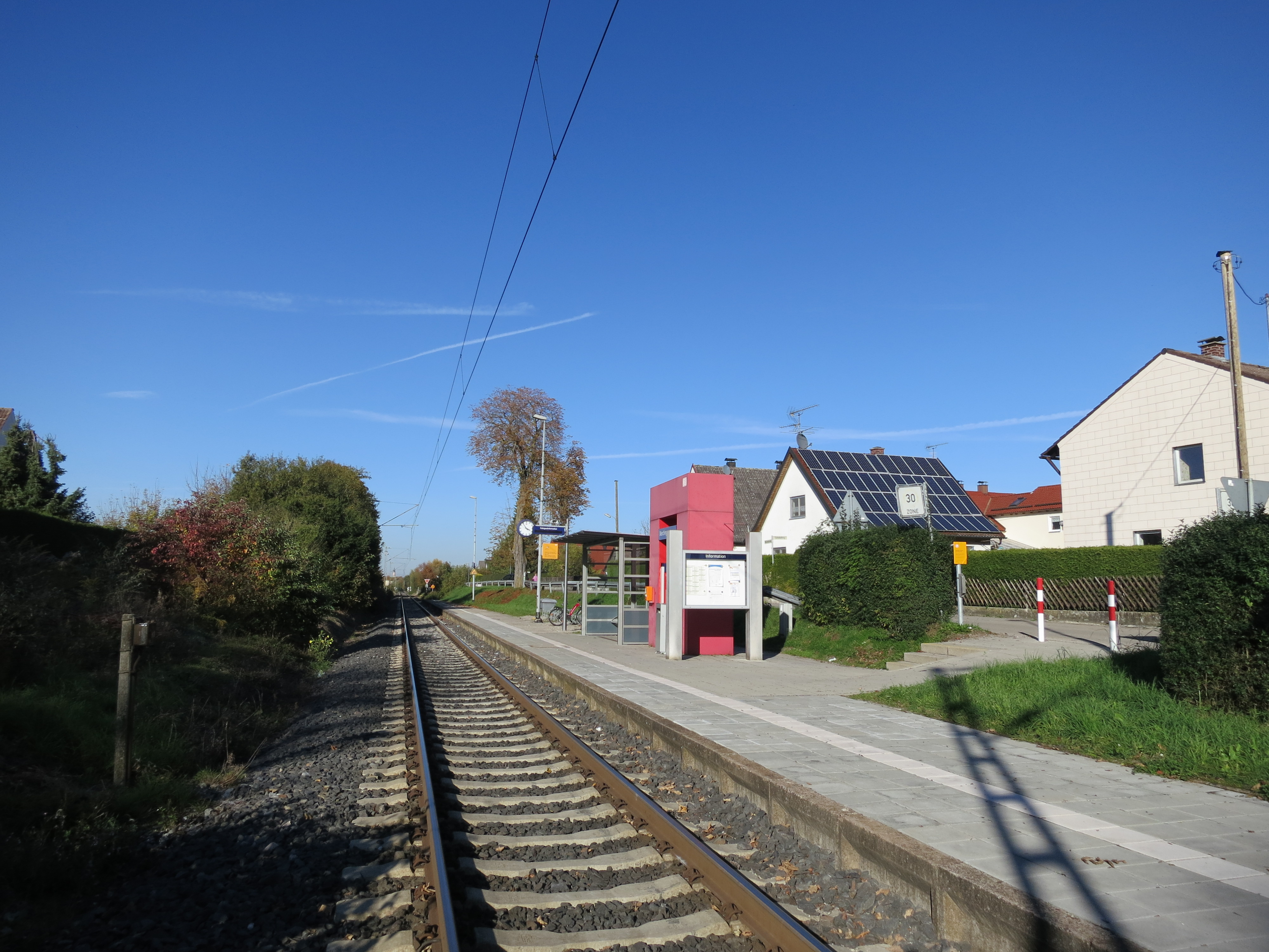 Seitenbahnsteig des Haltepunkts Merching an der Ammerseebahn